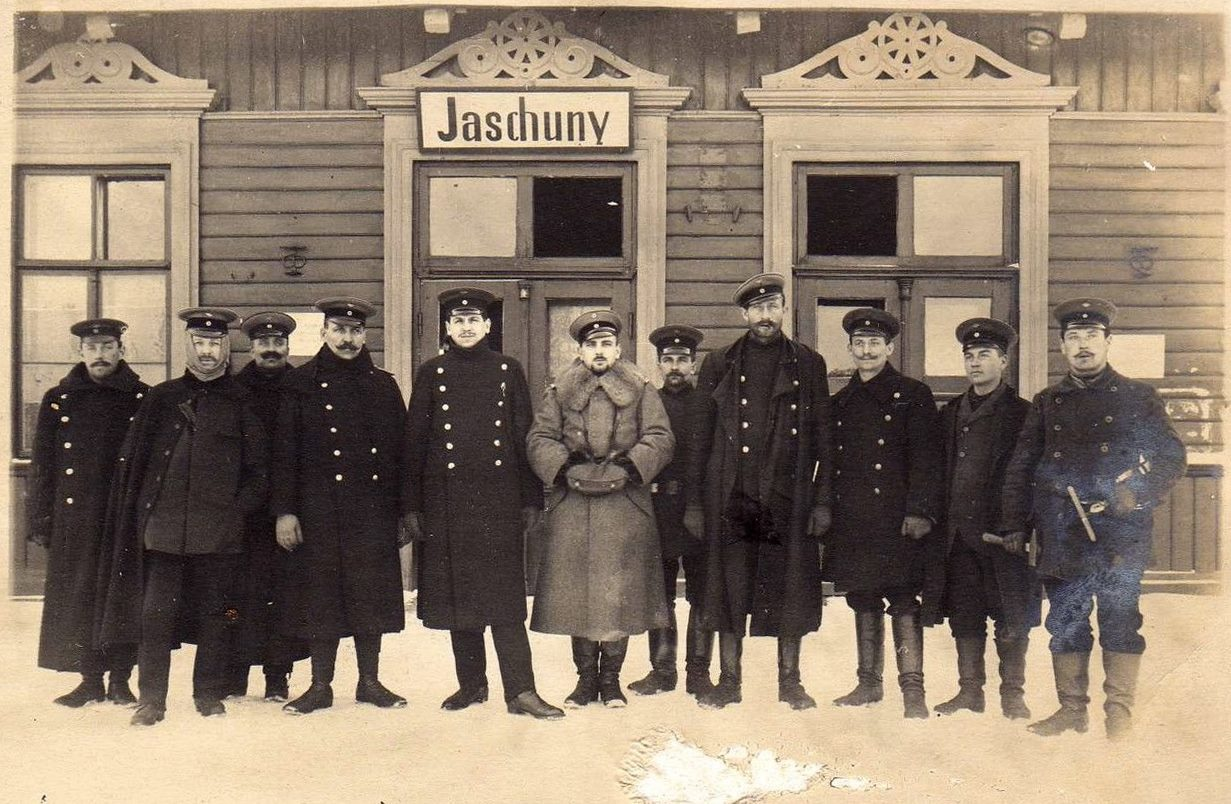 Беларуская (тарашкевіца): Яшуны (Jašuny). Чыгуначная станцыя